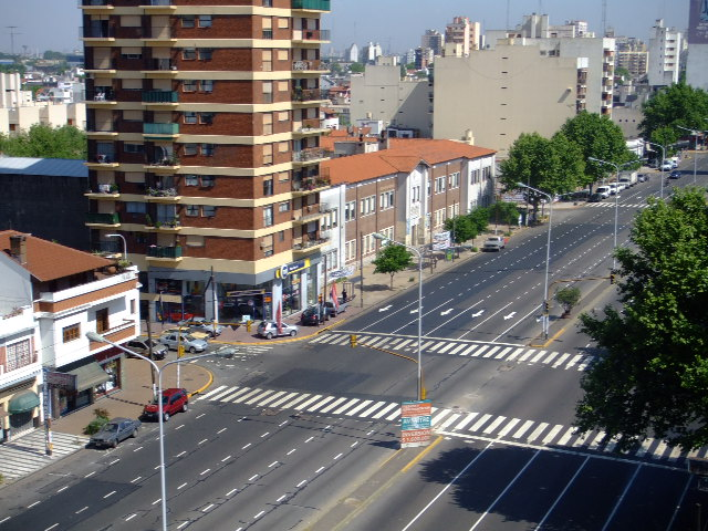 Foto de la Avenida Mitre al 2200, Partido de Avellaneda, Provincia de Buenos Aires.